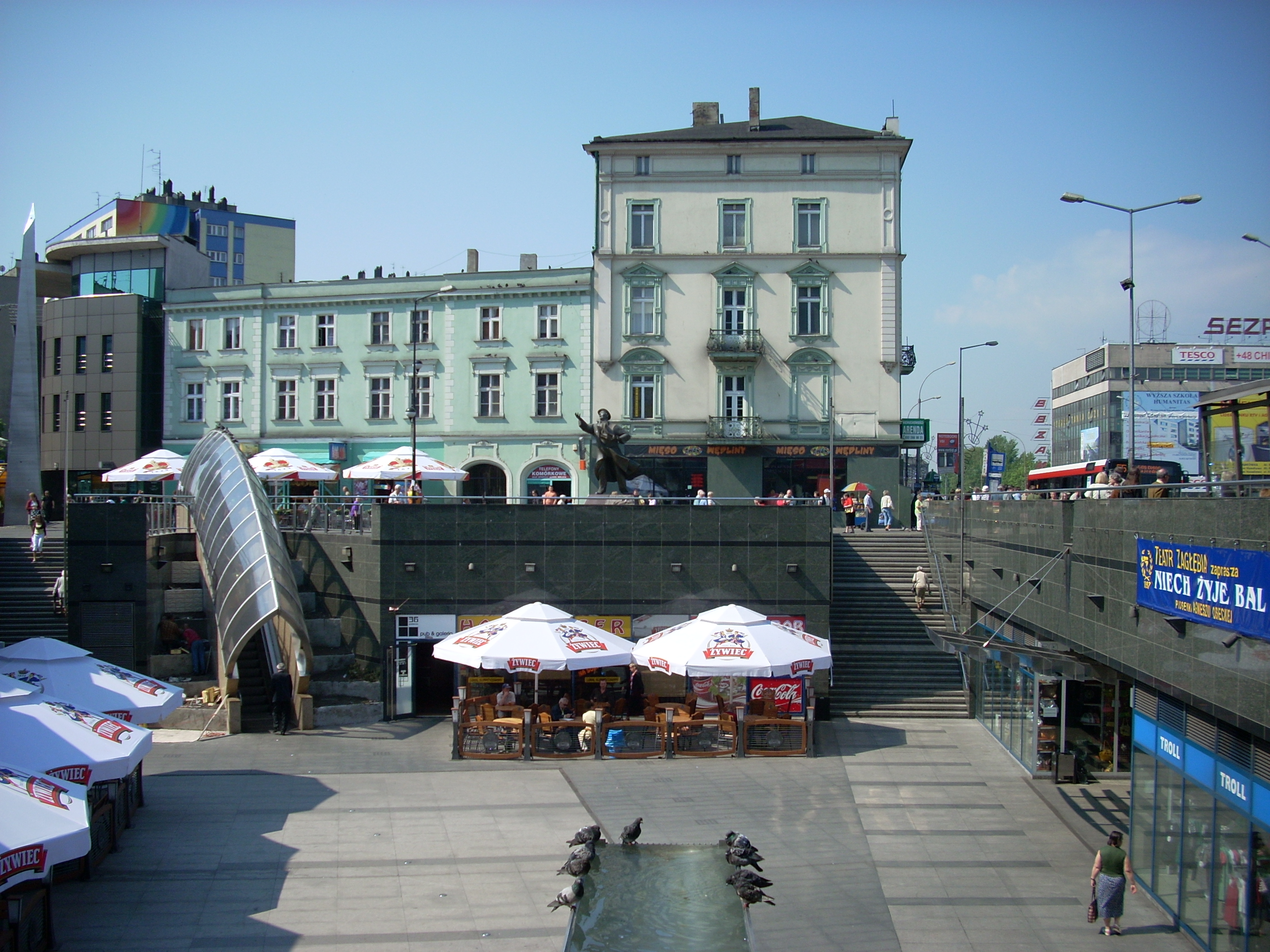 Plac Stulecia w Sosnowcu